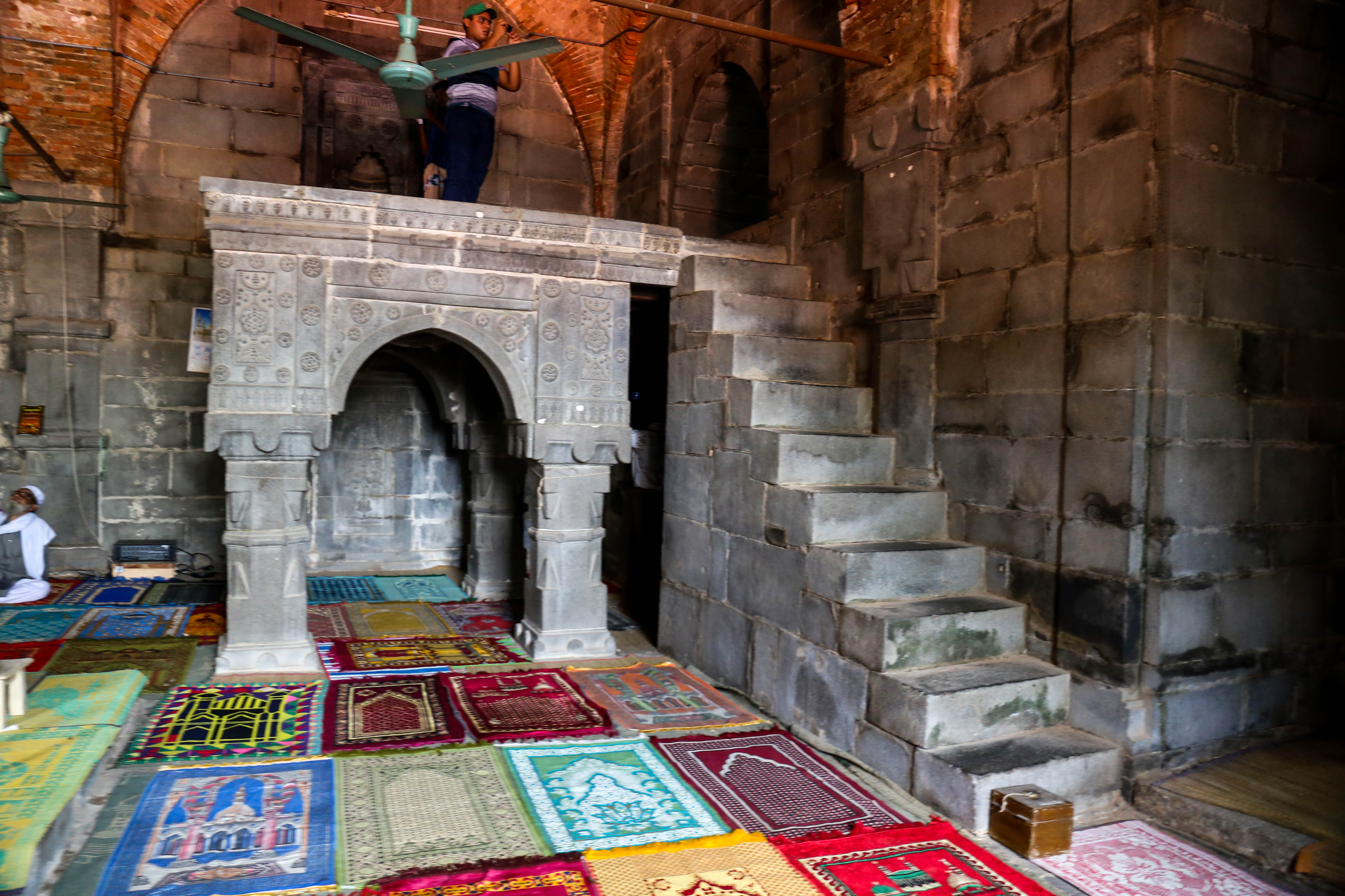 একদিকে ভেতরে চোখে পড়ে উঁচু পাটাতন আর তাতে চড়ার সিঁড়ি। সবটাই পাথরের তৈরি